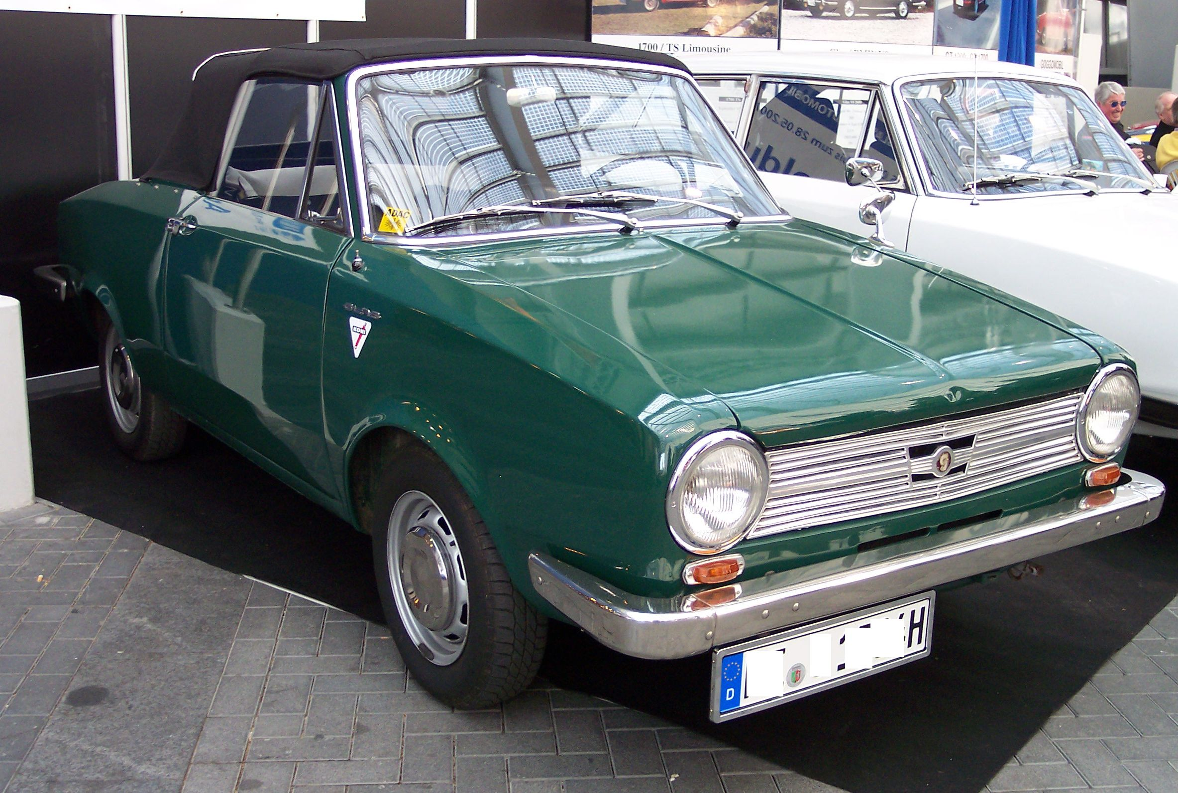 Glas 1304 cabrio green